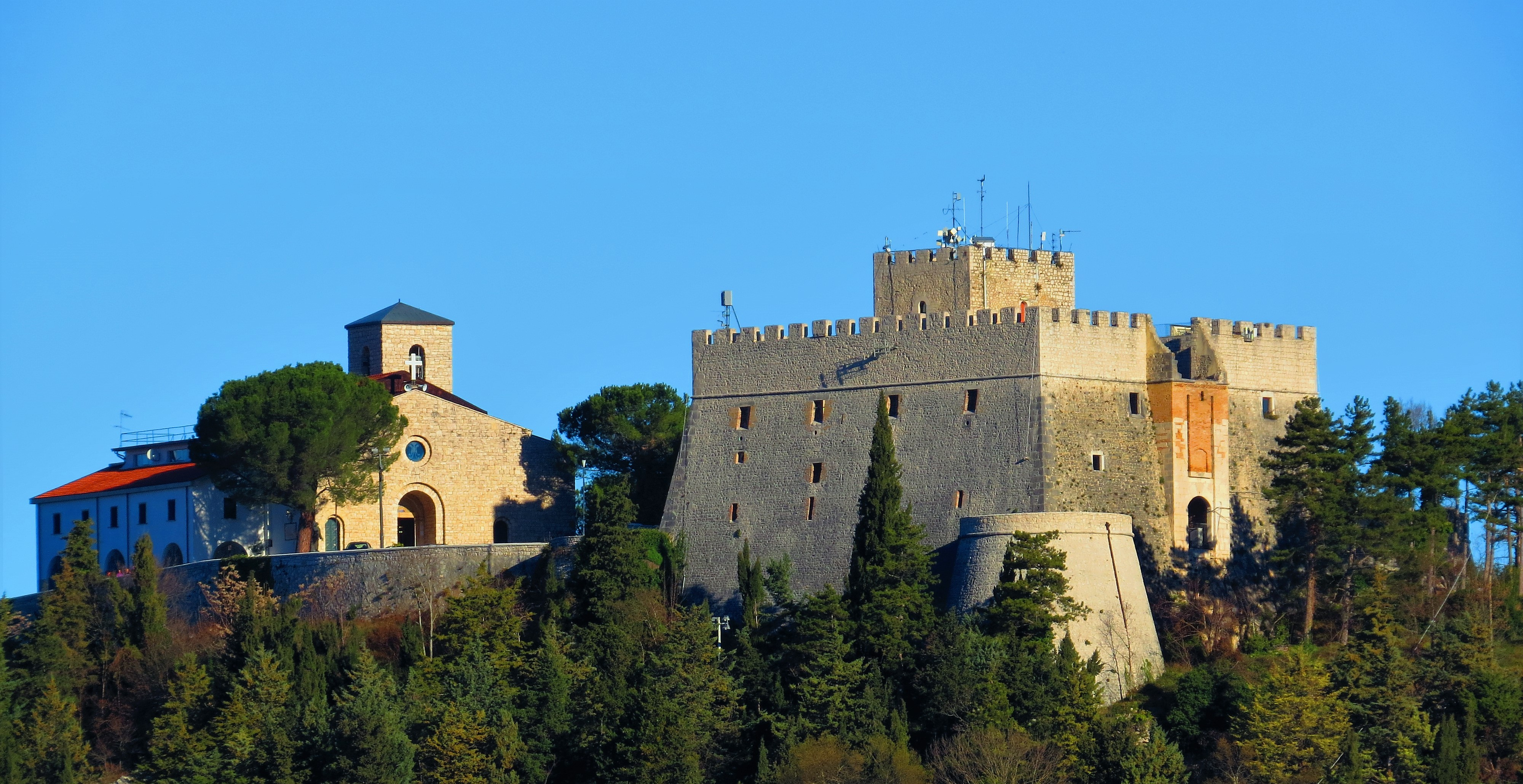 Campobasso